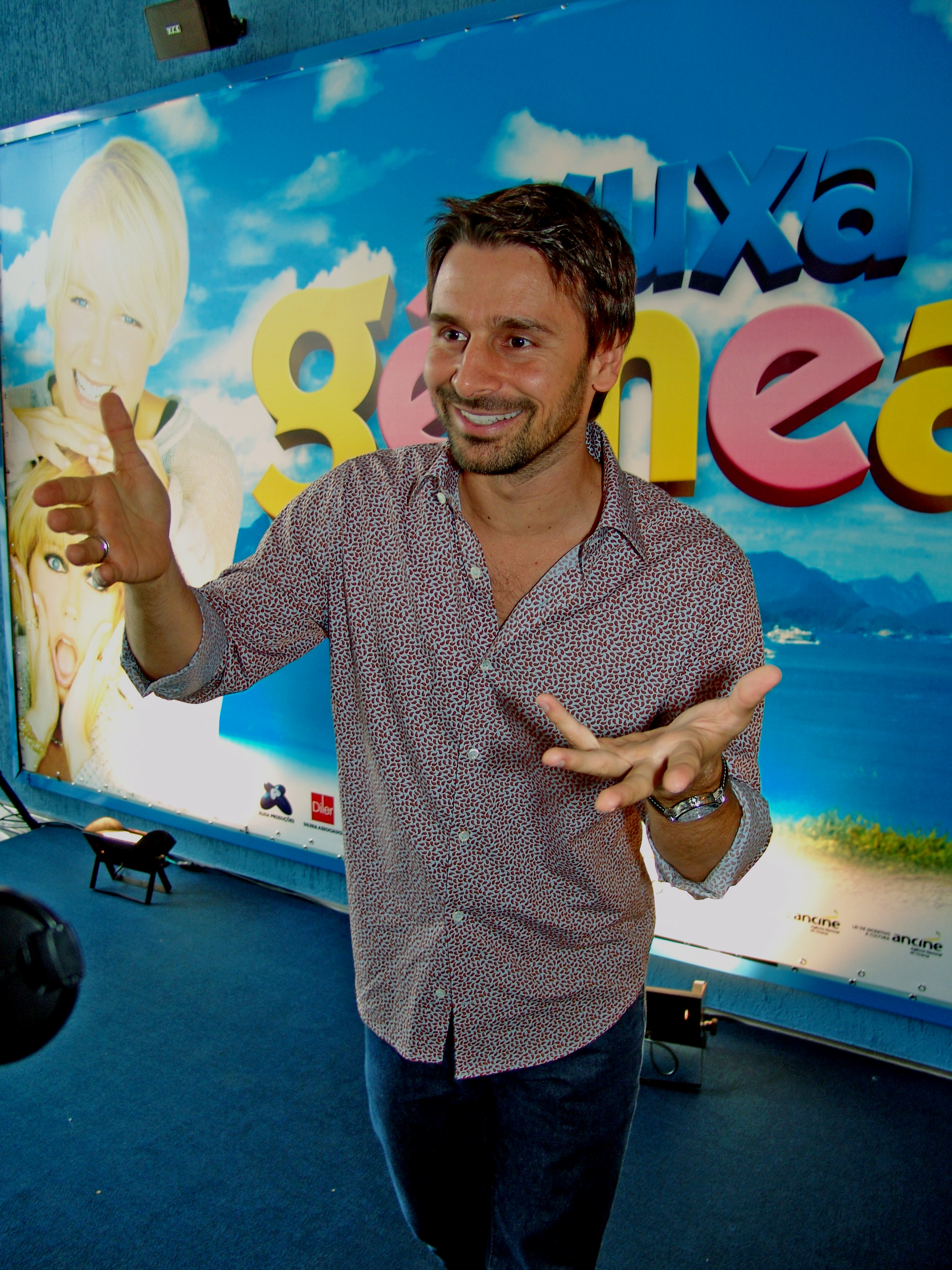 Murilo Rosa na estreia do filme "Xuxa Gemeas" em 2006.